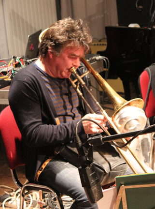 Walter Wierbos auf dem SWR NEWJazz Meeting: „hübsch acht“, mit Carl Ludwig Hübsch - tuba, compositions, Isabelle Duthoit – clarinet, Joris Rühl – clarinet, Matthias Schubert – tenorsax, Wolter Wierbos – trombone, Philip Zoubek – piano, Joker Nies – electronics